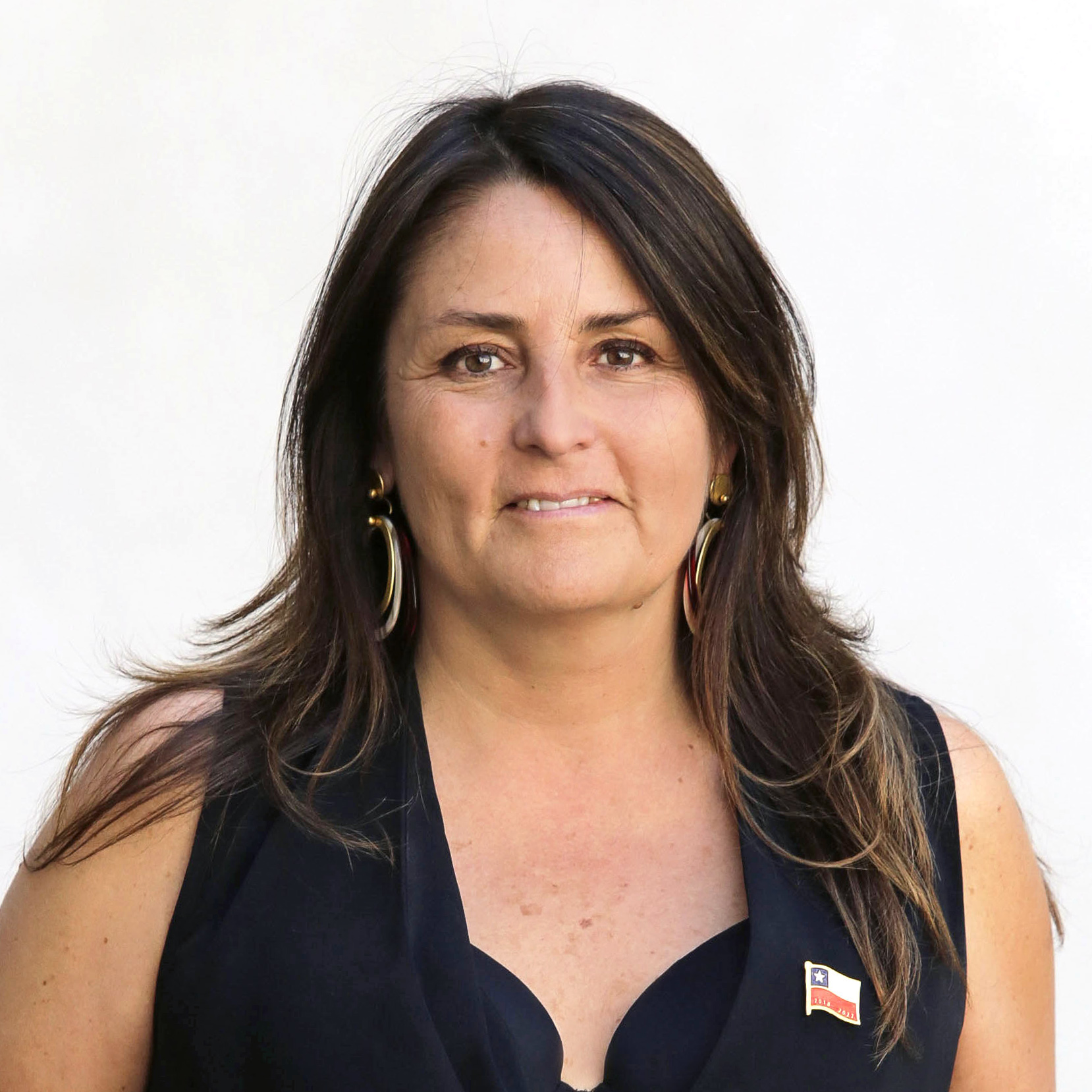 Foto oficial de María de los Ángeles de la Paz